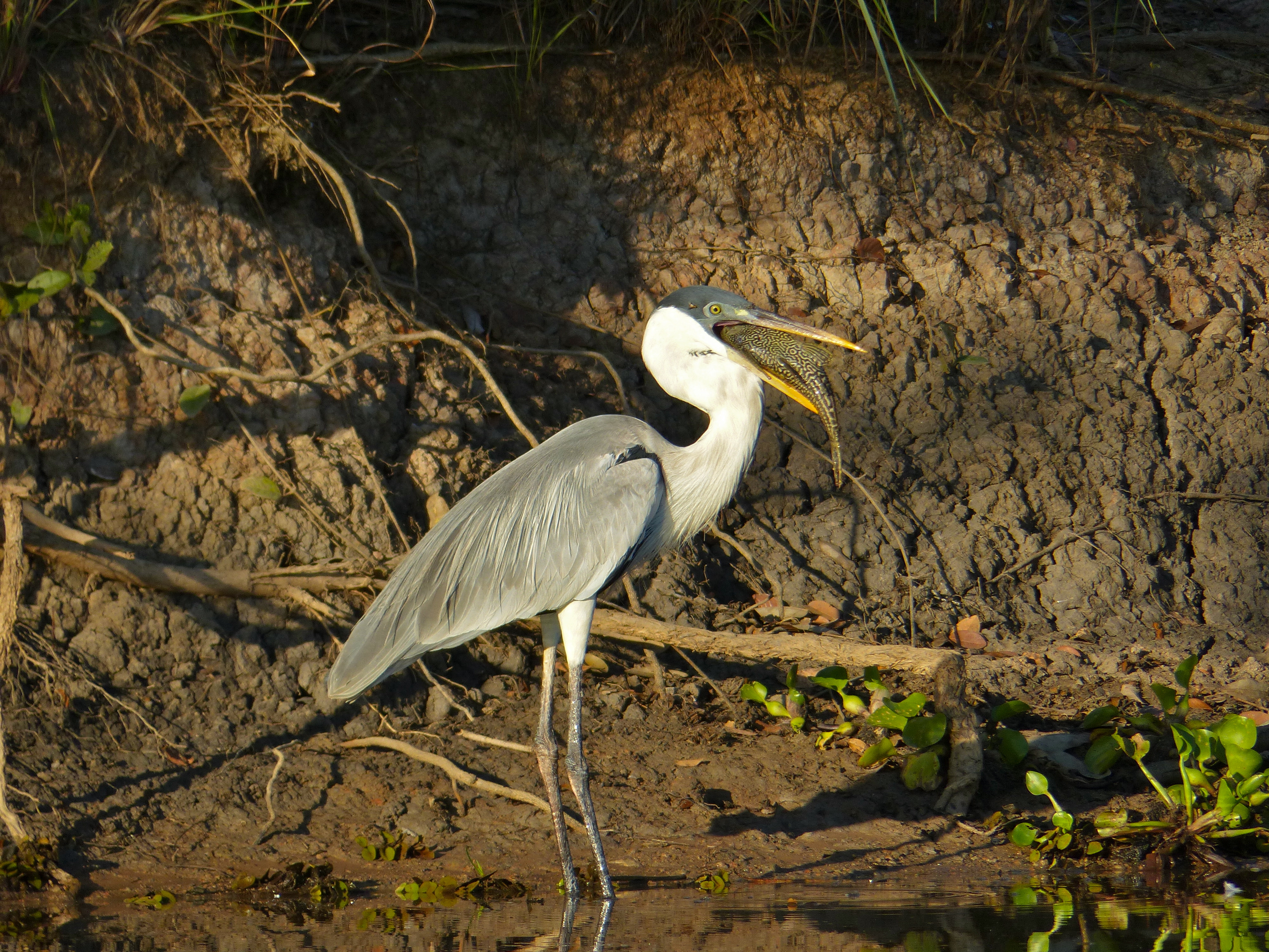 Rio Claro, Transpantaneira, Poconé, Mato Grosso, BRAZIL